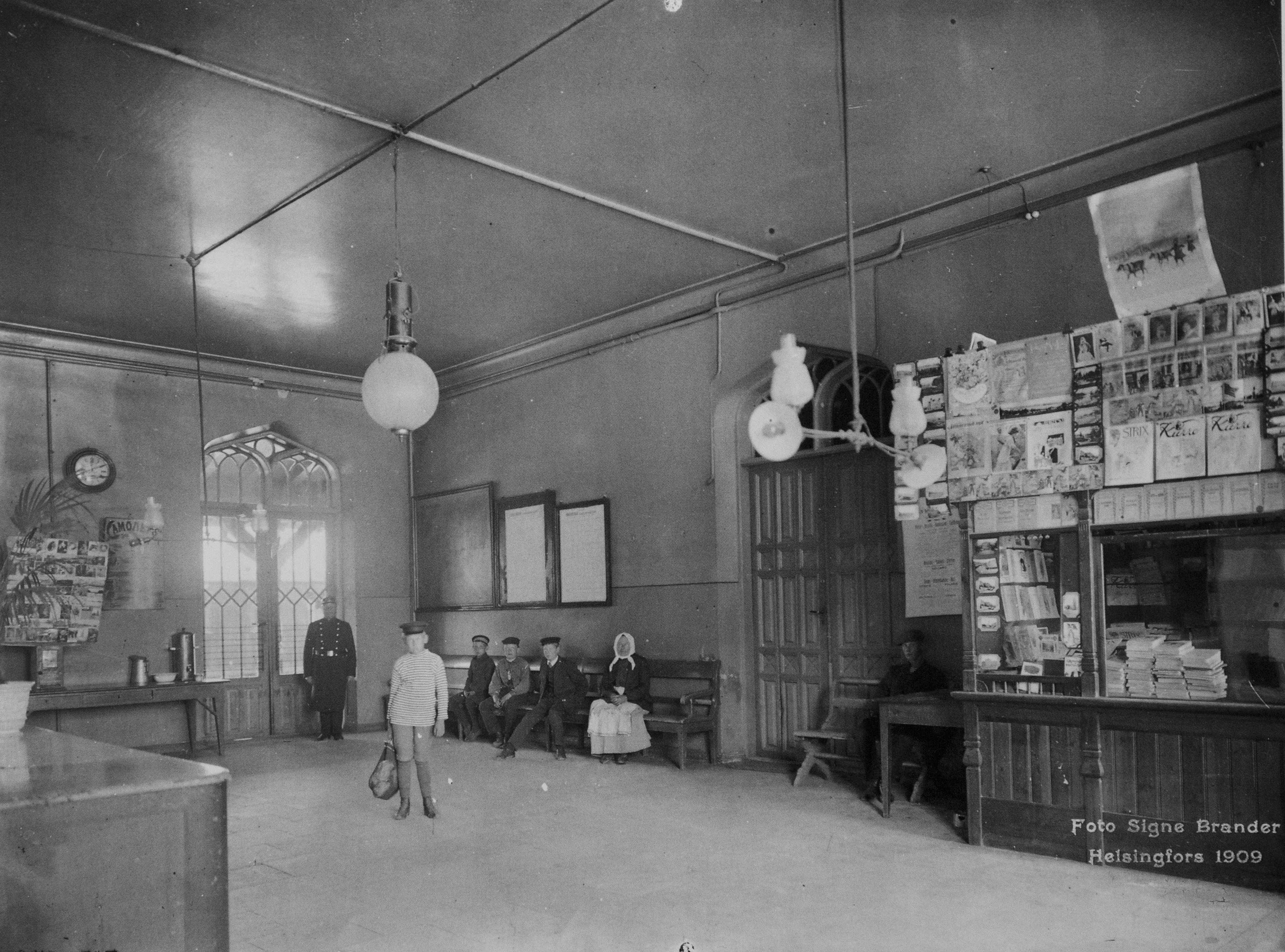 Helsingin vanha rautatieasema 3. luokan odotustila vuodelta 1909.